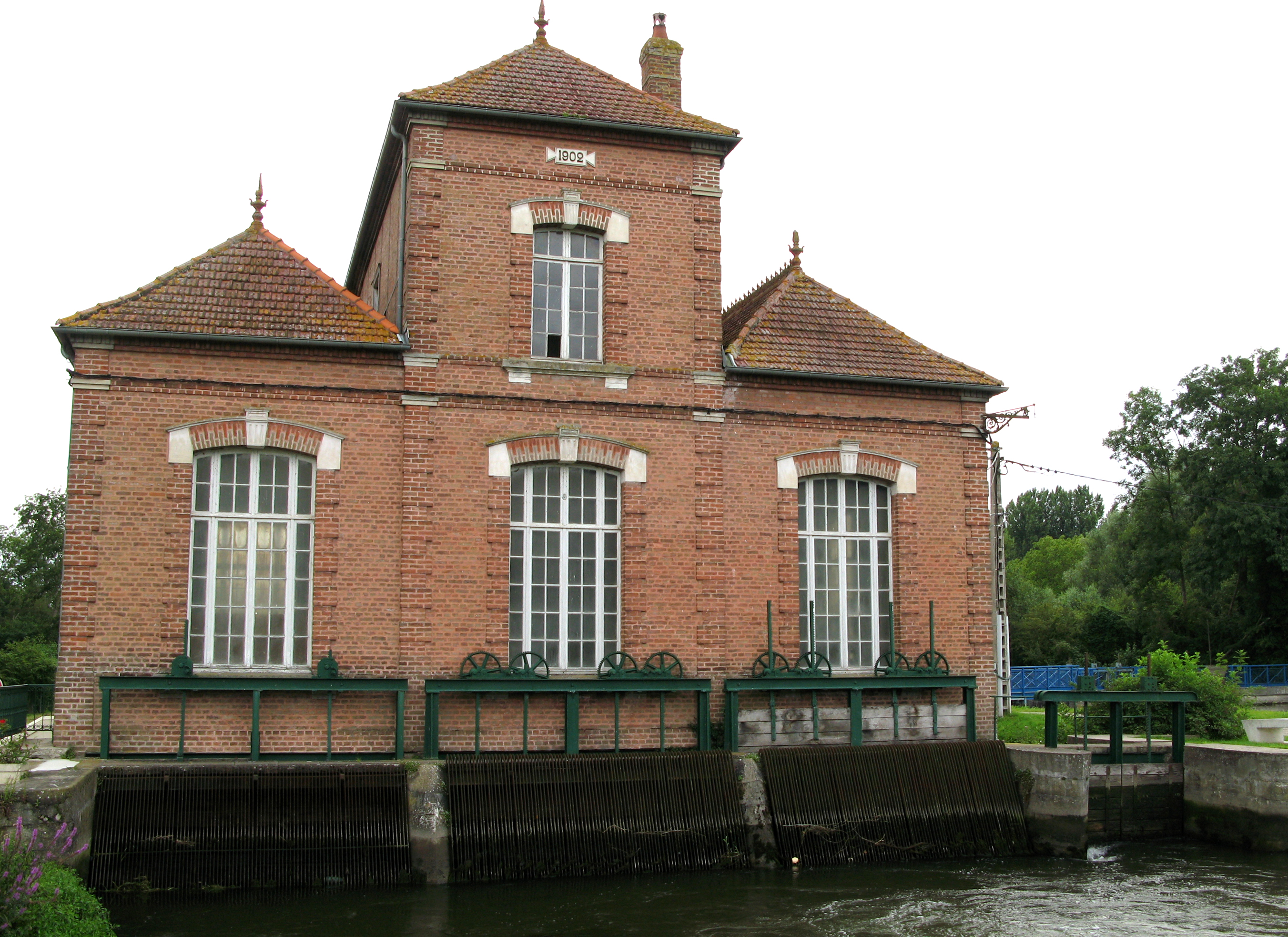 Long (Somme, France) - L'usine hydro-électrique.